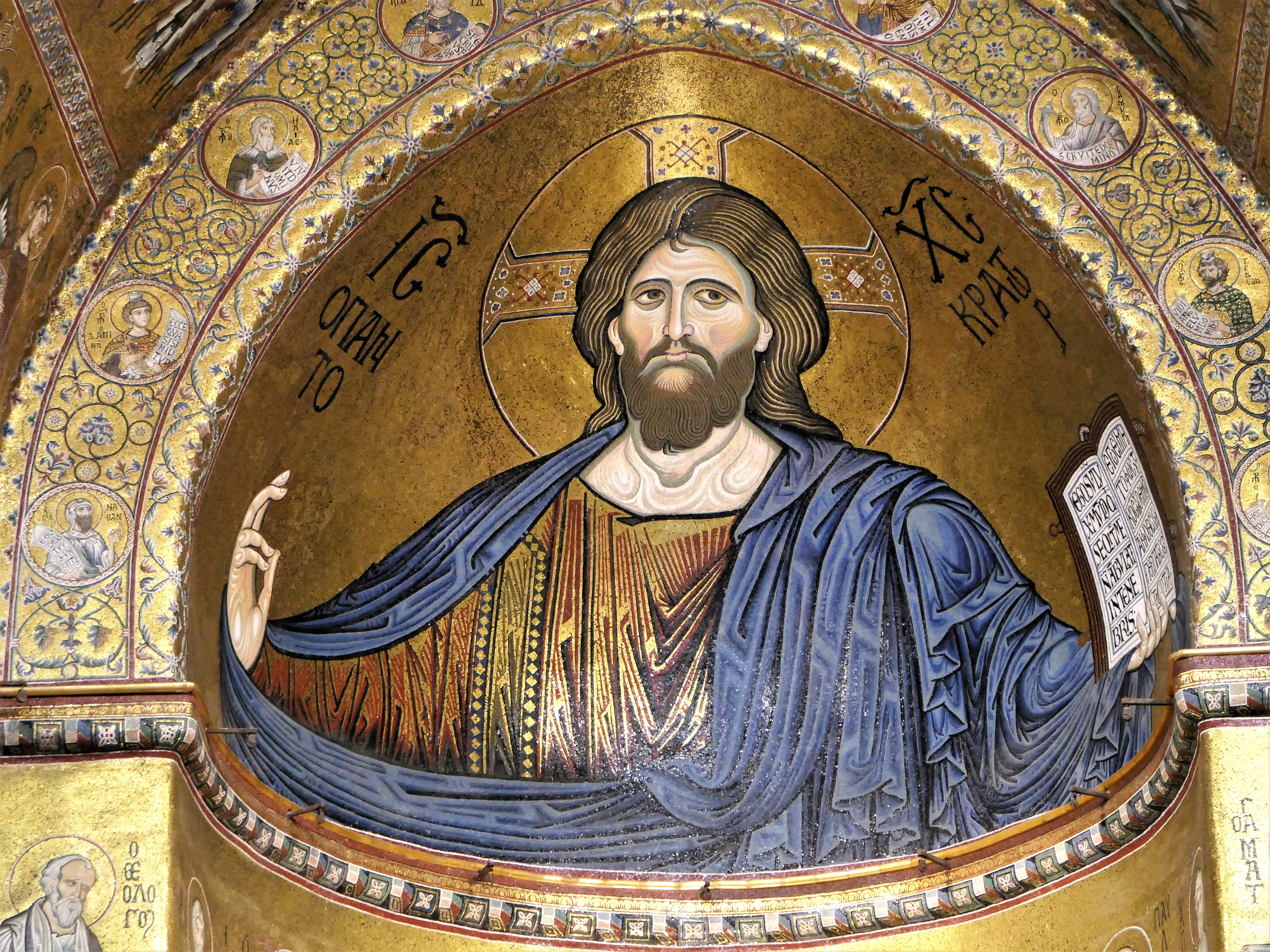 In der Hauptapsis ist Christus als Pantokrator (Weltenherrscher) dargestellt, das goldene Mosaik beherrscht den gesamten Innenraum. Byzantine Mosaic in Norman Kathedral Monreale Sicily moreover 6000 m2 of byzantine mosaics